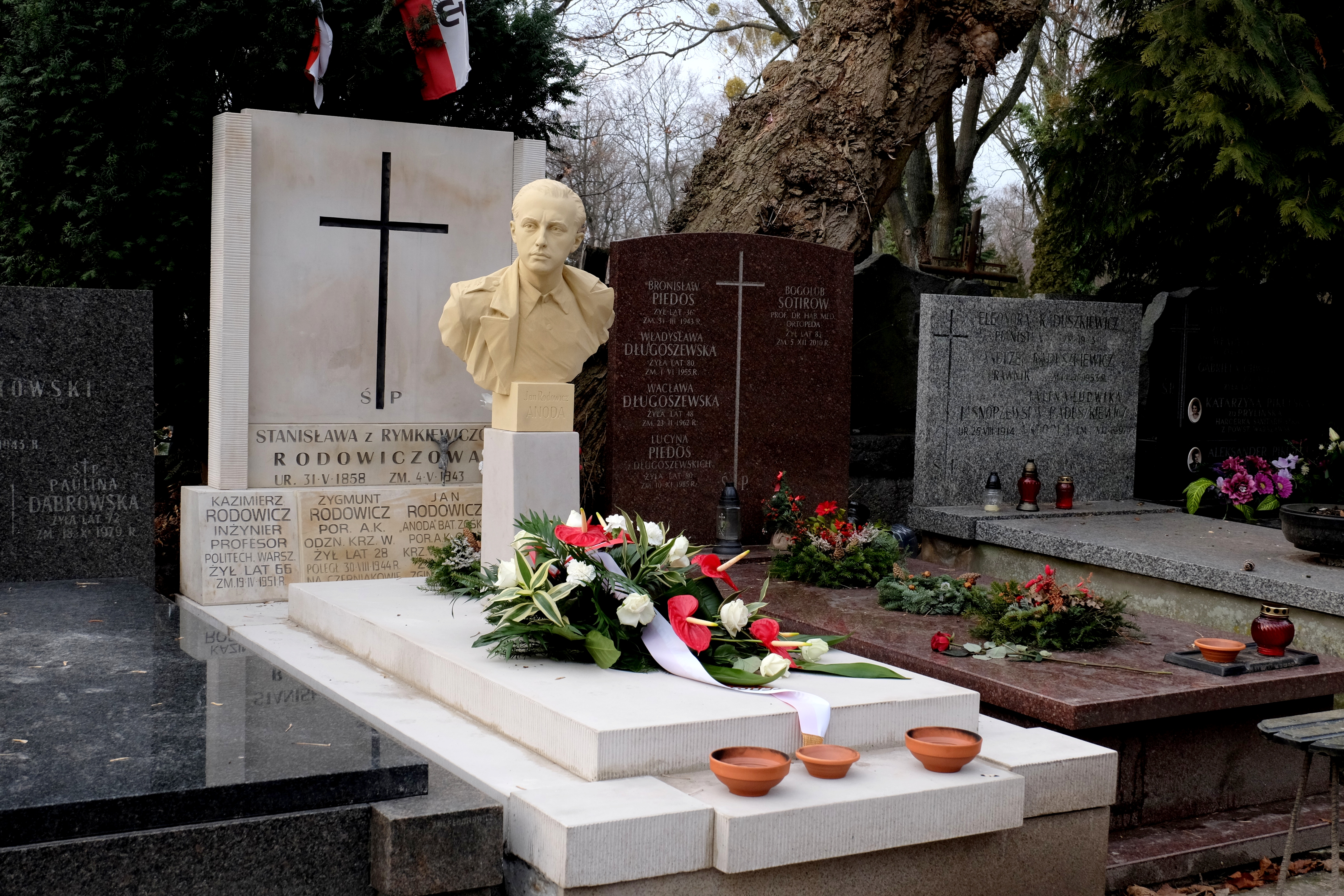 Grób prof. Kazimierza Rodowicza oraz jego synów Jana Rodowicza ps. "Anoda" oraz Zygmunta Rodowicza – działaczy konspiracji niepodległościowej w czasie II wojny światowej na Cmentarzu Powązkowskim w Warszawie